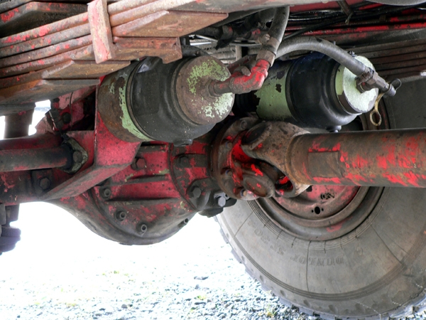 Задний мост автомобиля Magirus-Deutz